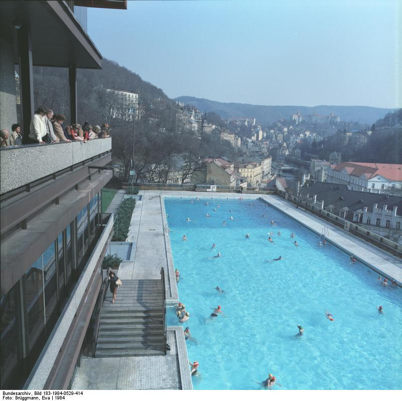 ADN-ZB/Brüggemann/ 29.5.84 /CSSR/Karlovy Vary Zum Komplex des Sanatoriums "Thermal" gehört ein im Felsenhang angelegtes Schwimmbecken. Es wird mit Thermalwasser gespeist und ist ganzjährig in Betrieb. Schwimmen wird bei speziellen Erkrankungen für Kurpatienten ärztlich verordnet. Aber auch Touristen haben die Möglichkeit dieses Schwimmbecken zu nutzen.